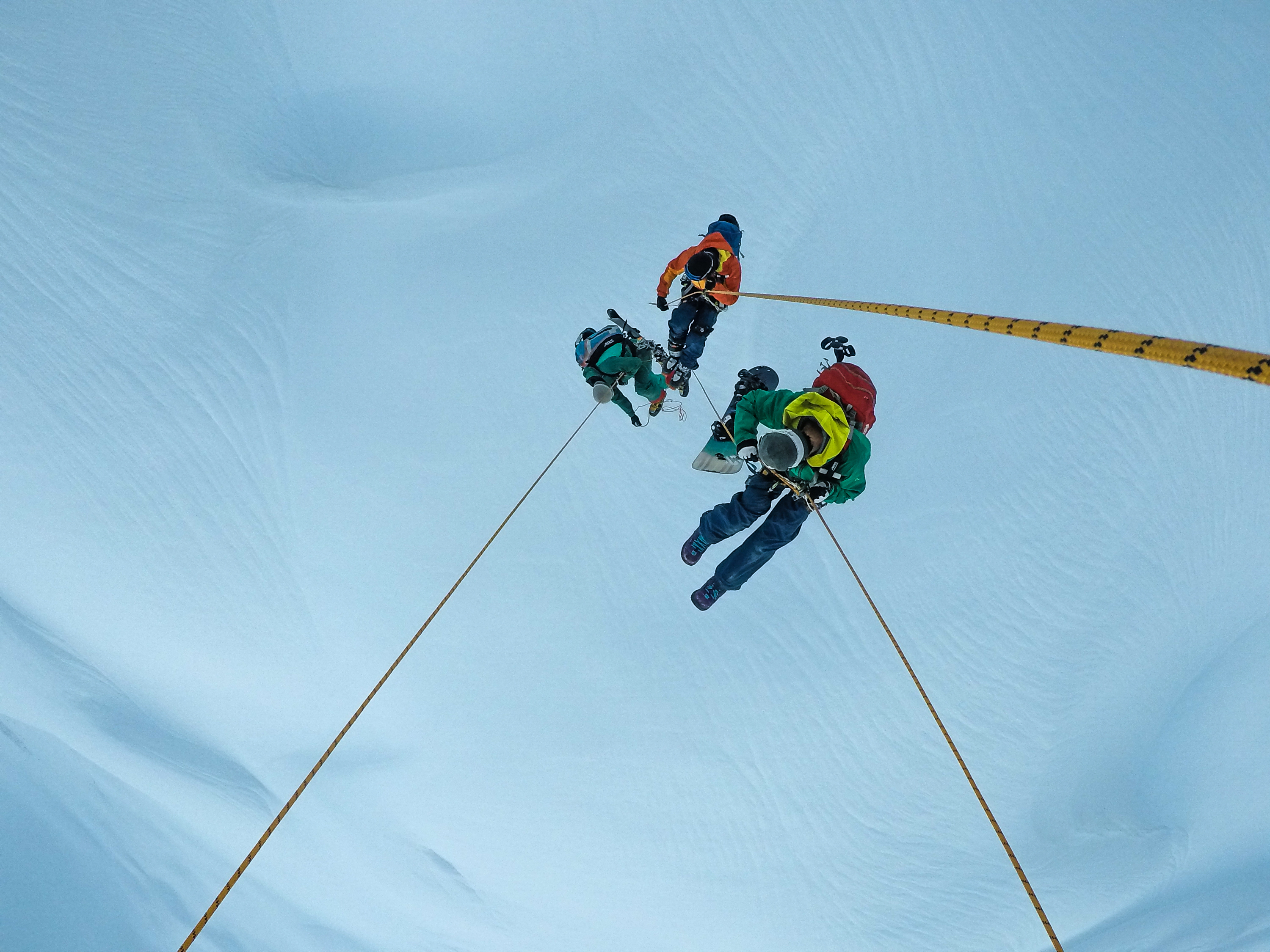 Balloonskiing - Sicht vom Piloten